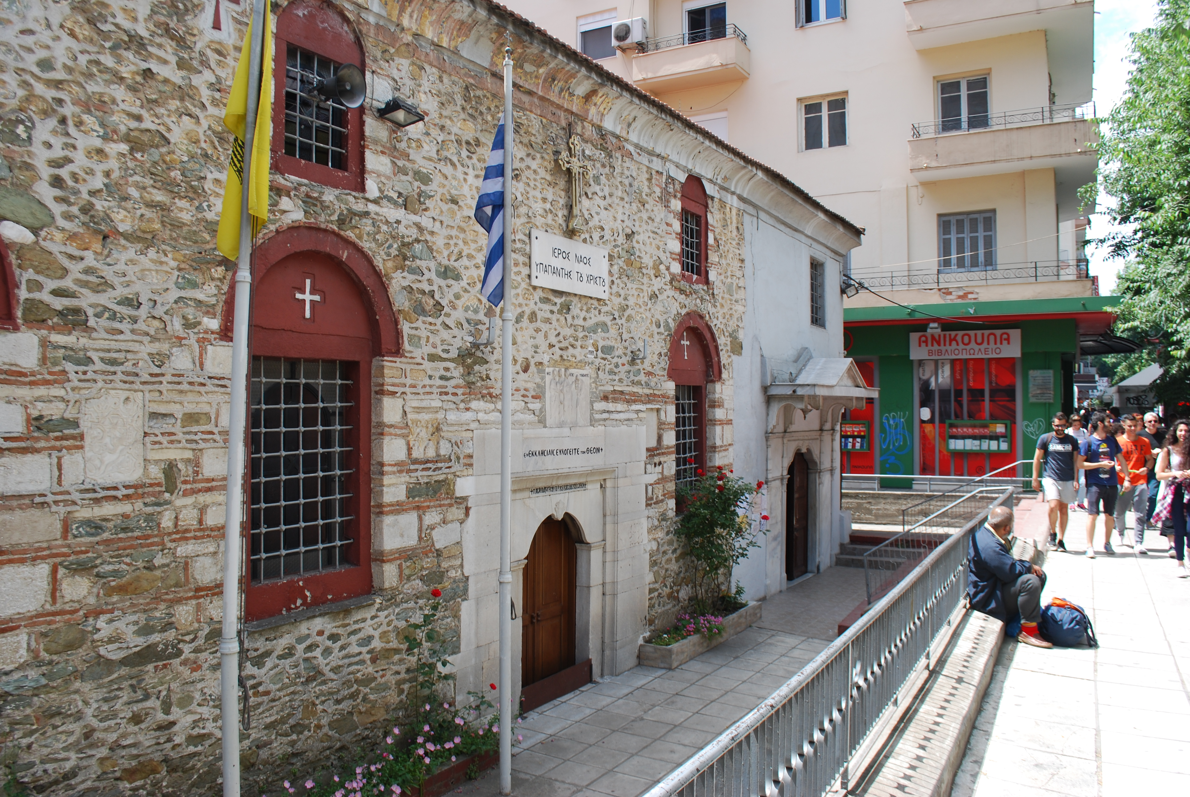 Vue de Thessalonique.